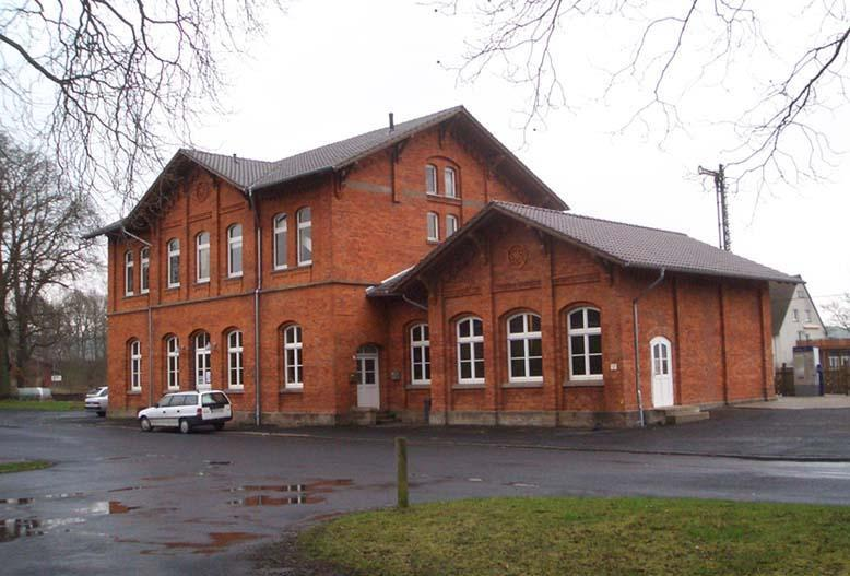 Kulturbahnhof Uslar.